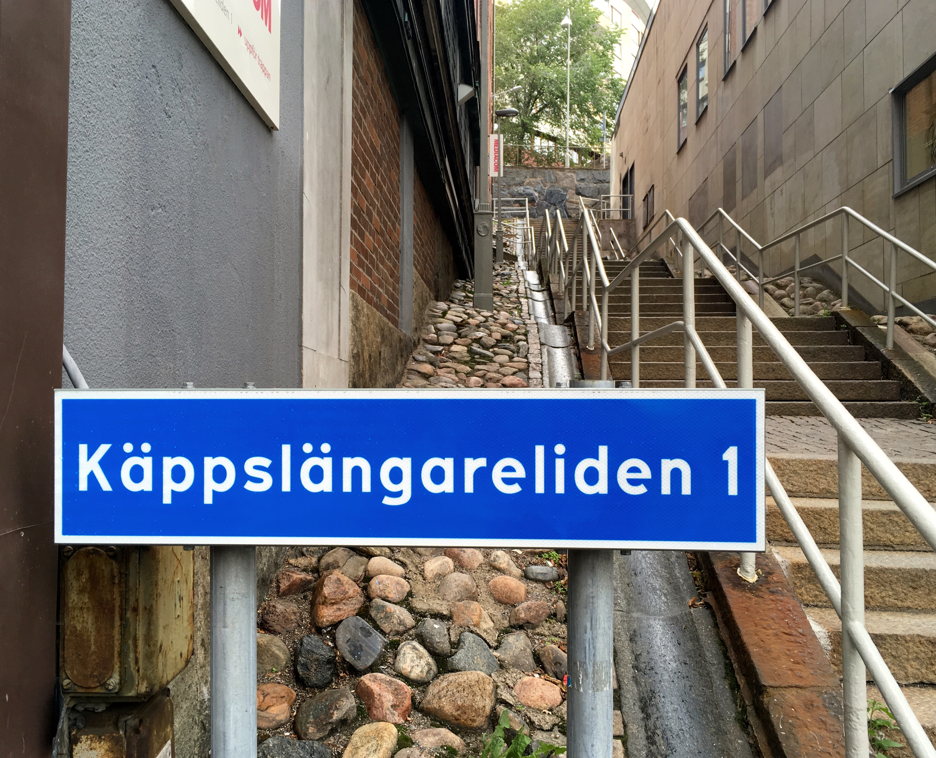 Käppslängareliden förbinder numera Otterhälllegatan med Kungsgatan i Göteborgs innerstad.